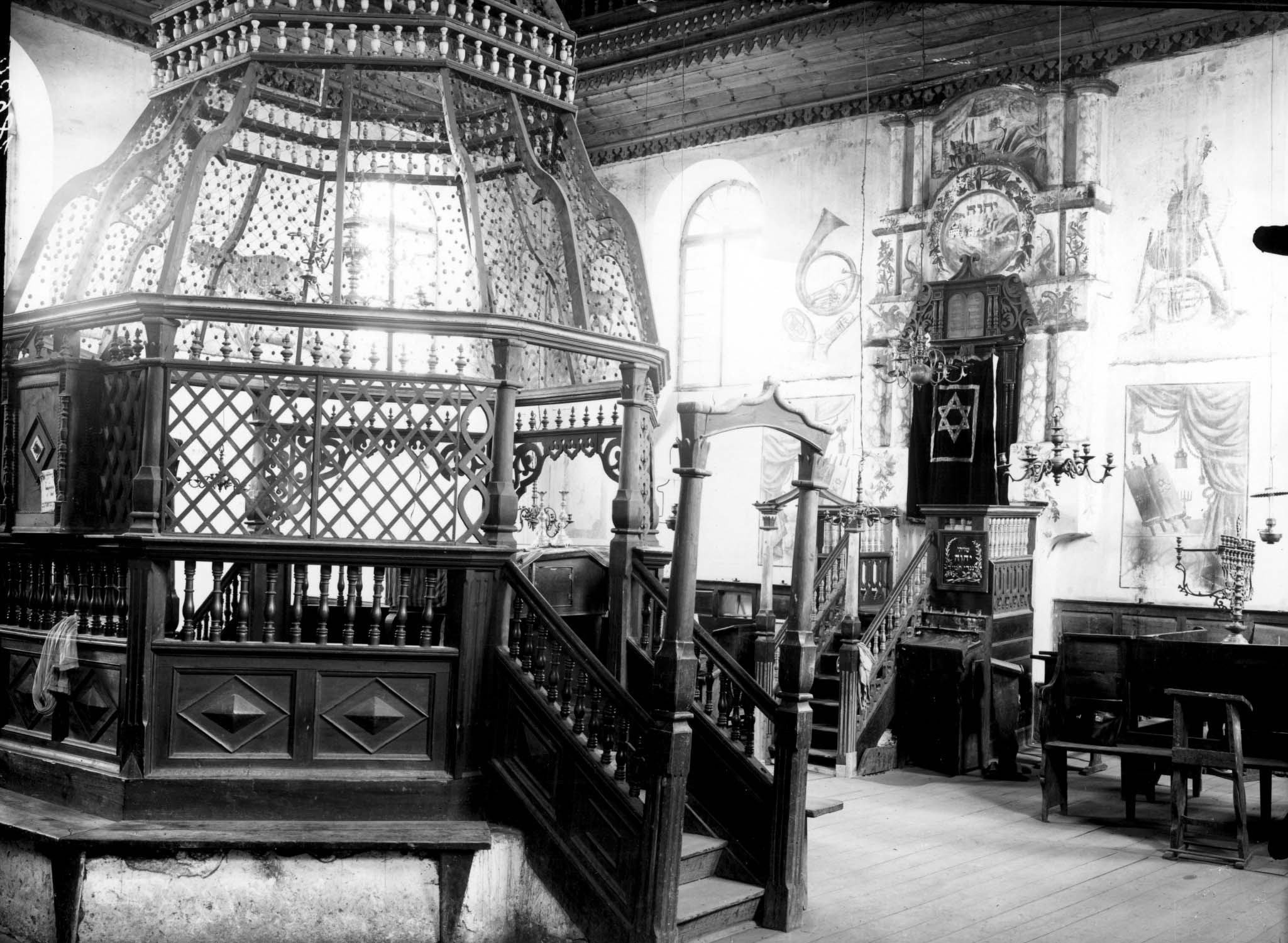 Беларуская (тарашкевіца): Дзярэчын (Dziarečyn). Сынагога